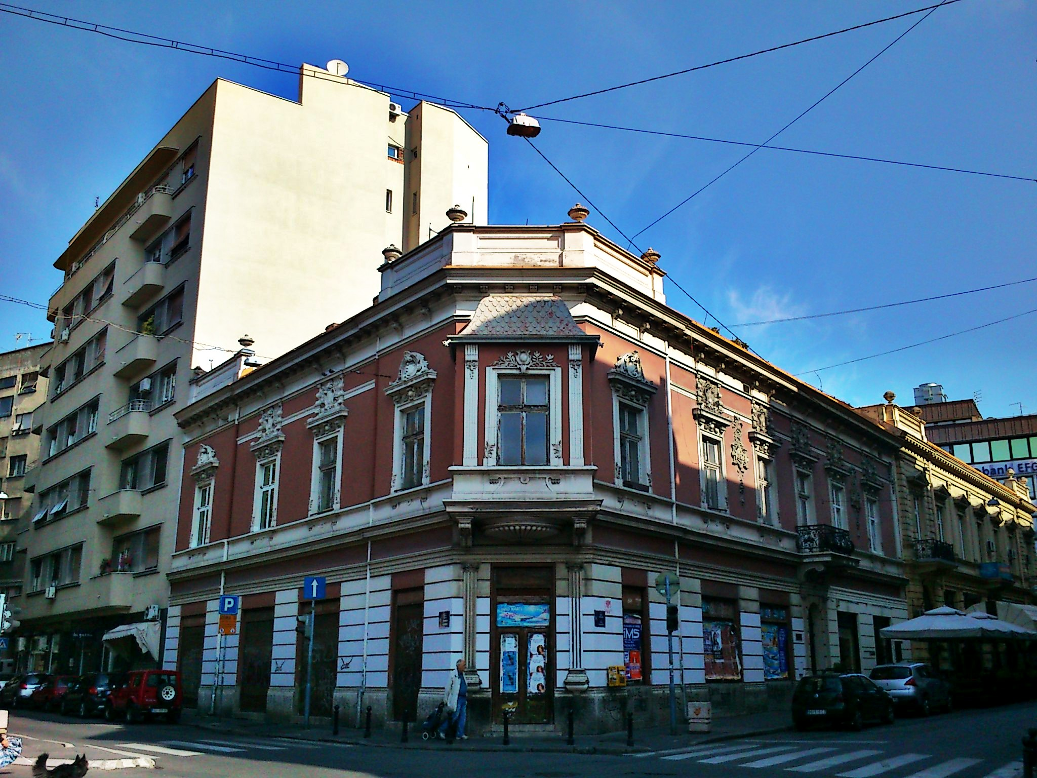 Кућа Николе Предића